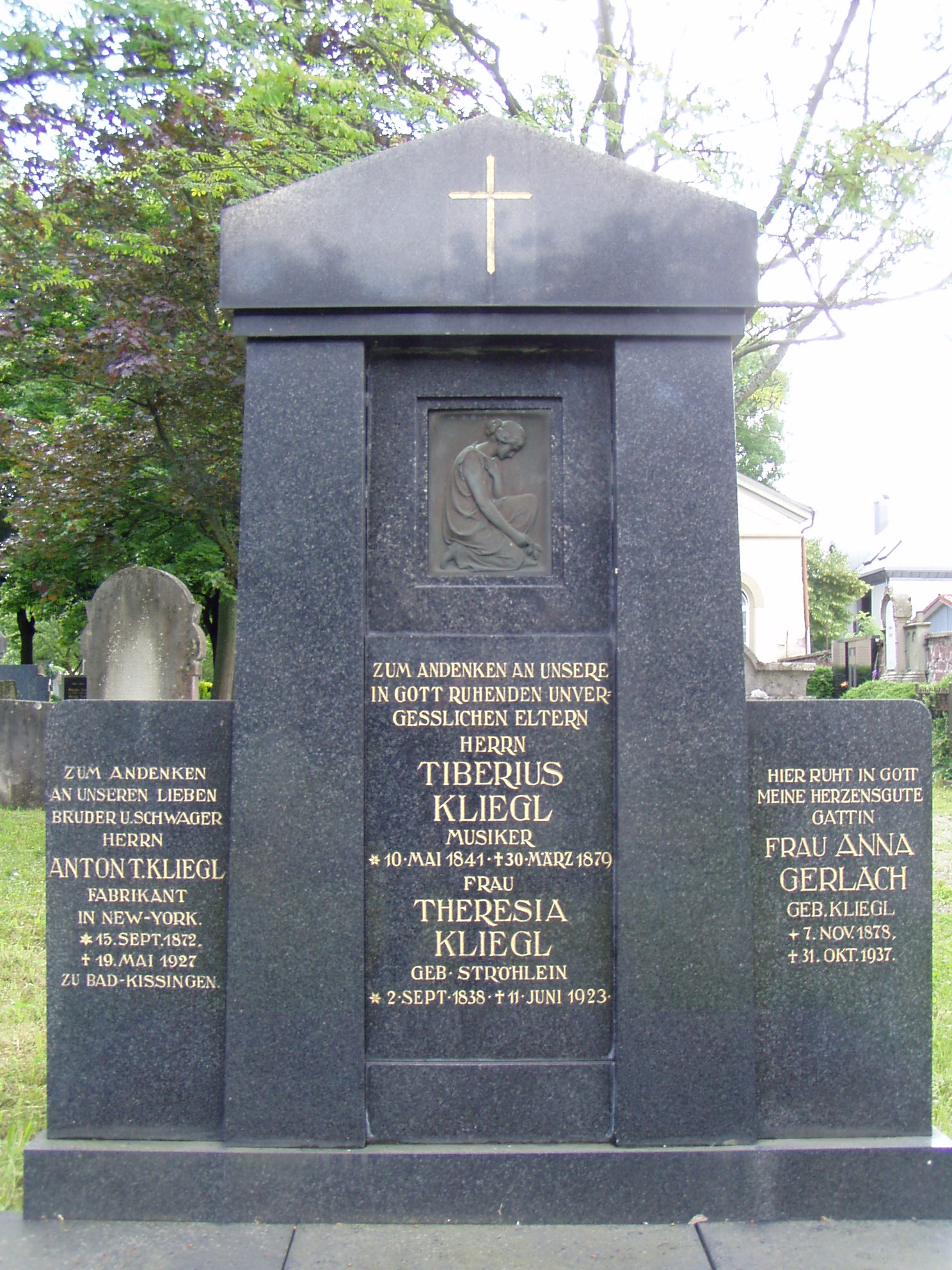 Tombstone of Anton Kliegl (1872-1927), Bad Kissingen